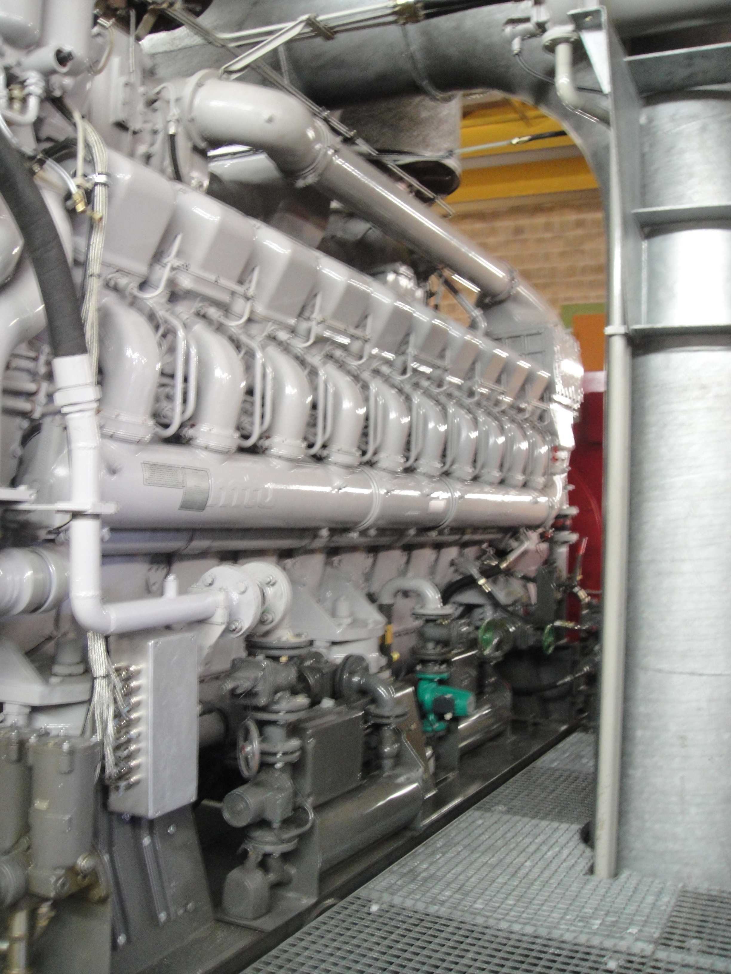 Diesemotor im Dieselkraftwerk Leinau, Typ MTU 20 V 956 TB 32 (4.400 kW)